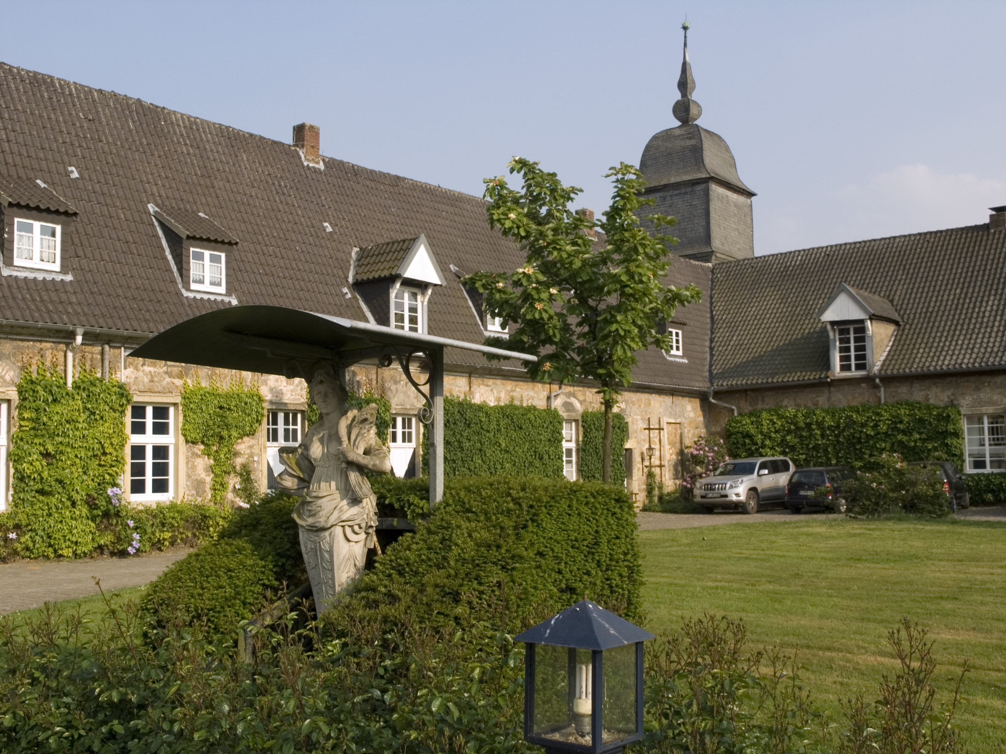 Северный Рейн-Вестфалия, Дорстен - Замок Лембек